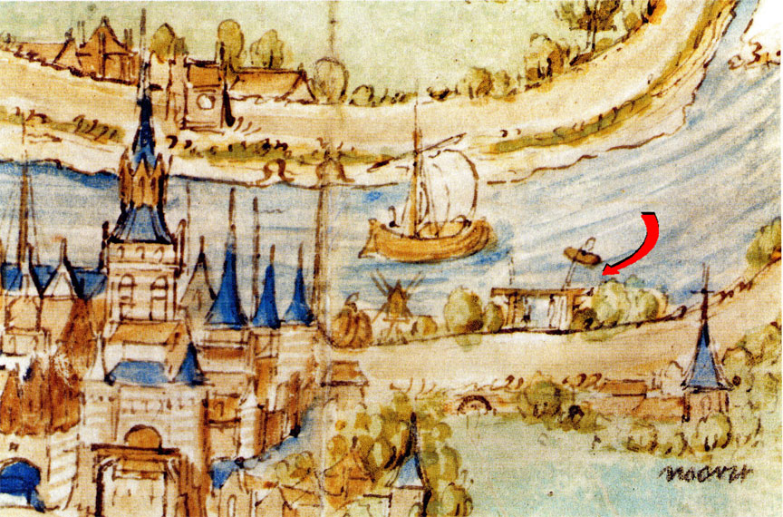 fragment van een kaart van Gouda door Pieter Dirksz Crabeth, rode pijl ingetekend door uploader verwijst naar het galgenveld bij Gouda